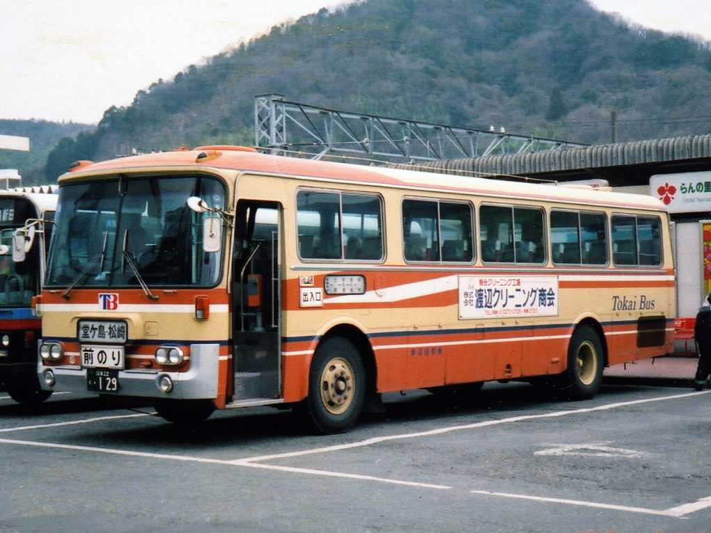 Tokai Bus 846 Isuzu BU20K at Shuzenji Sta.